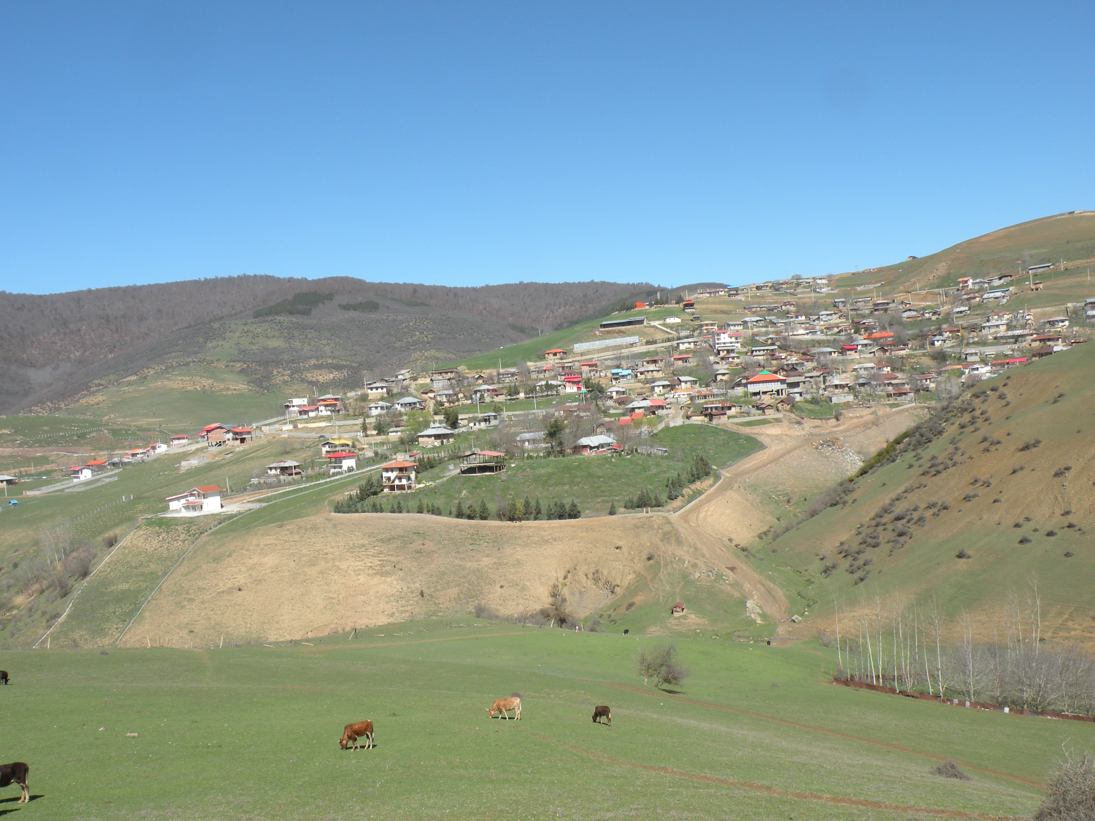 سودکلا ،فروردین 97